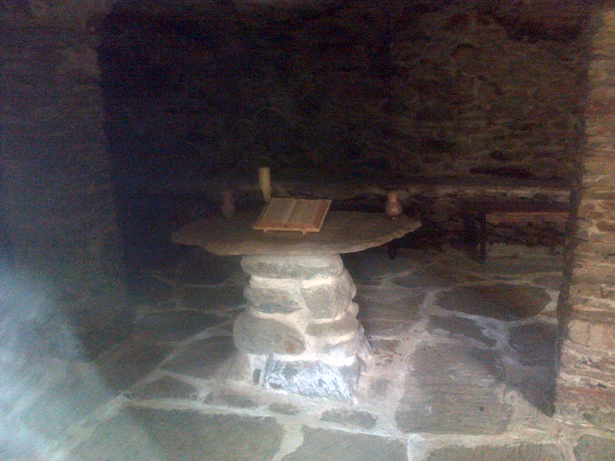 Altare della Cappella dell'Eremo di Padre Charles al Prietto